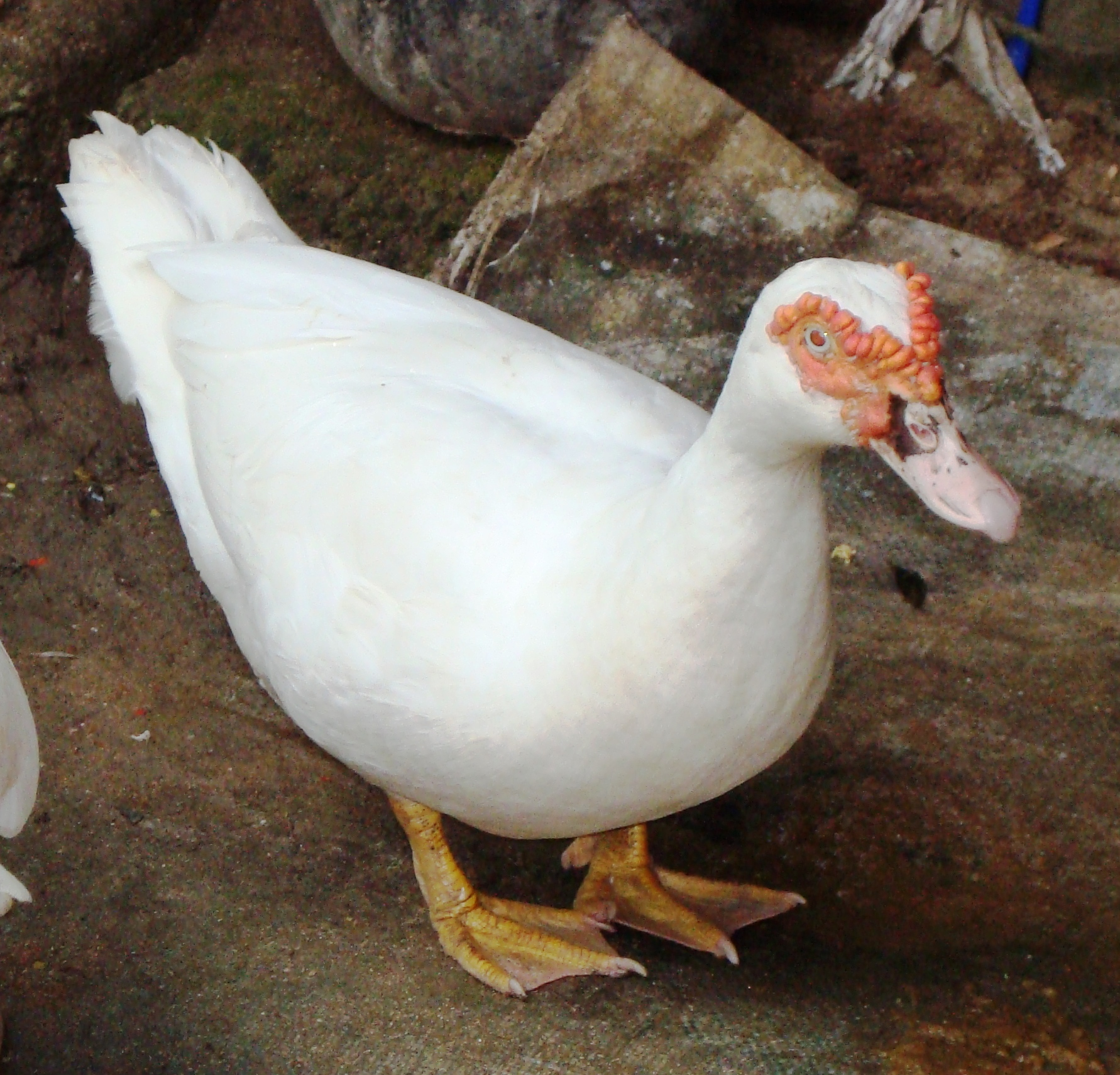 പറക്കും താറാവ്